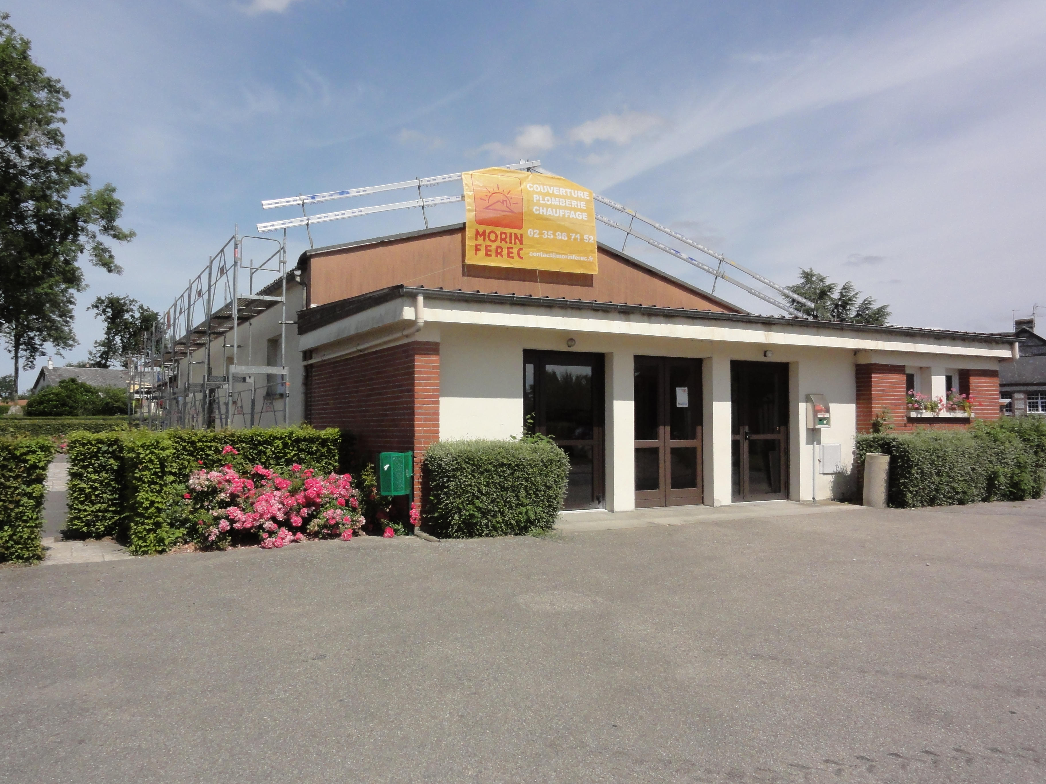 Rocquefort (Seine-Mar.) foyer rural